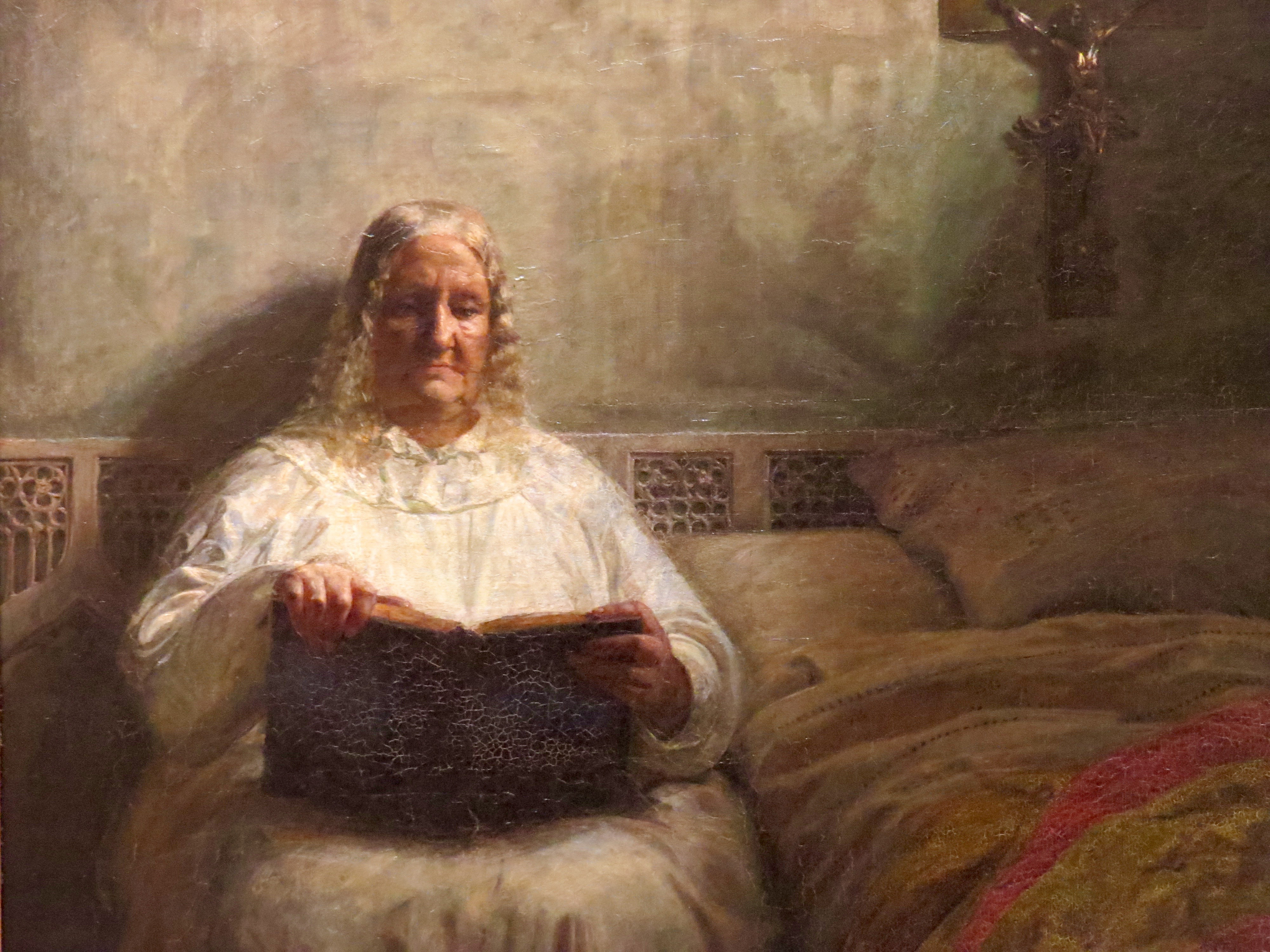 Leonora Christine i Maribo Kloster (detalje), malet af Kristian Zahrtmann i 1882, Statens Museum for Kunst, København